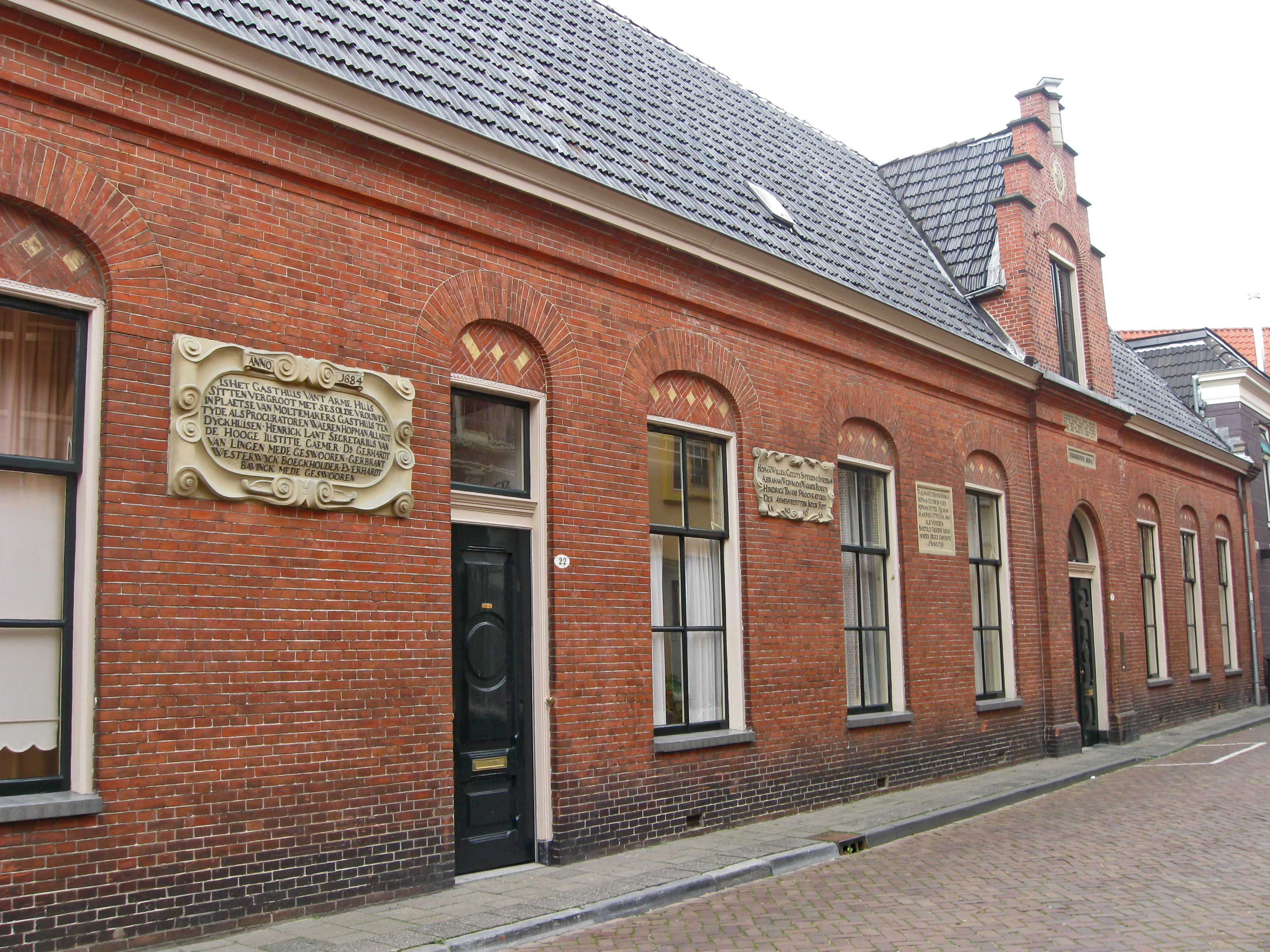 Groningen, A-Kerkstraat 22; Lamme Huiningegasthuis; 1600; rm 485440